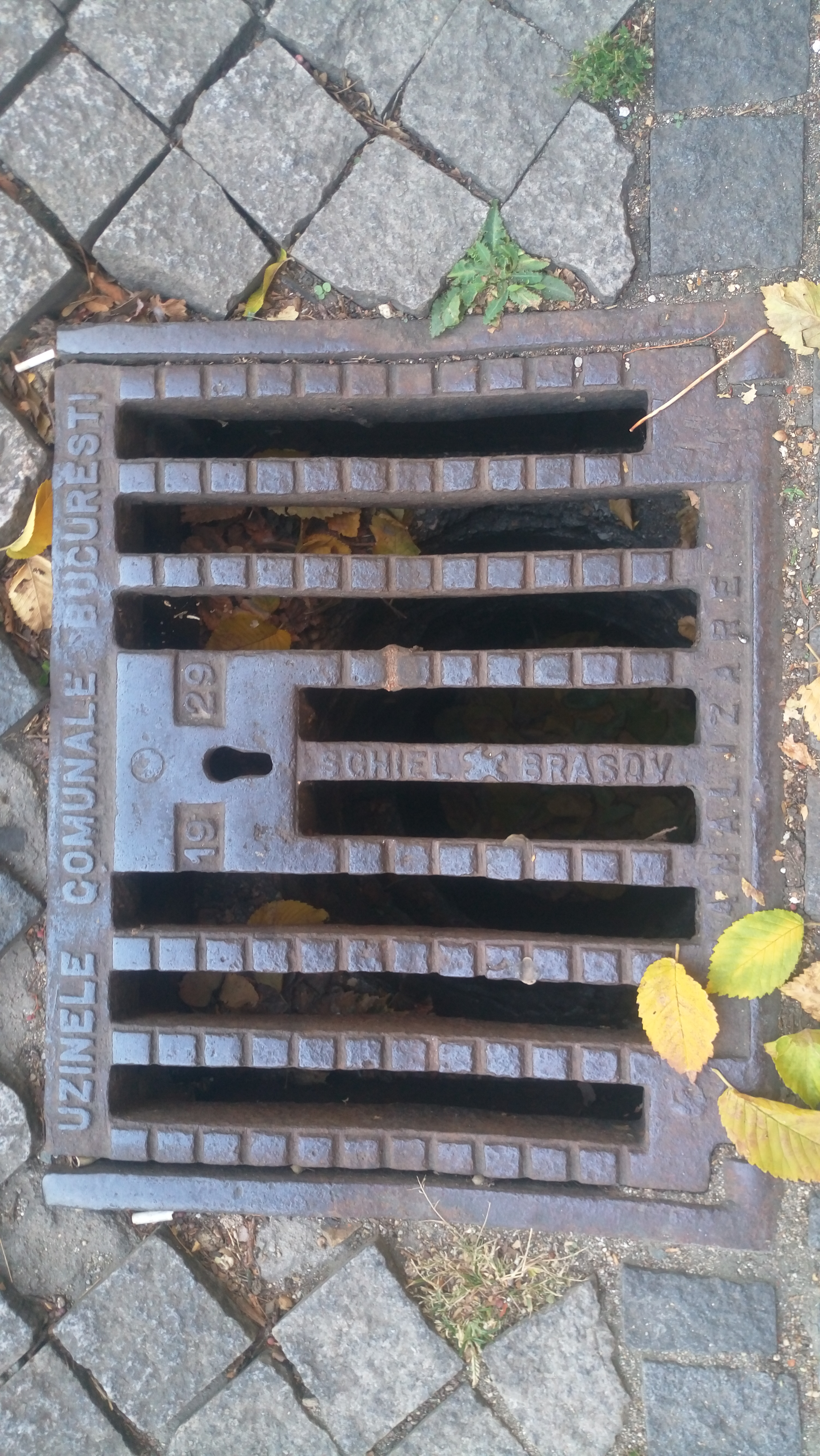 grilaj de fonta turnat la fabrica Schiel Brasov